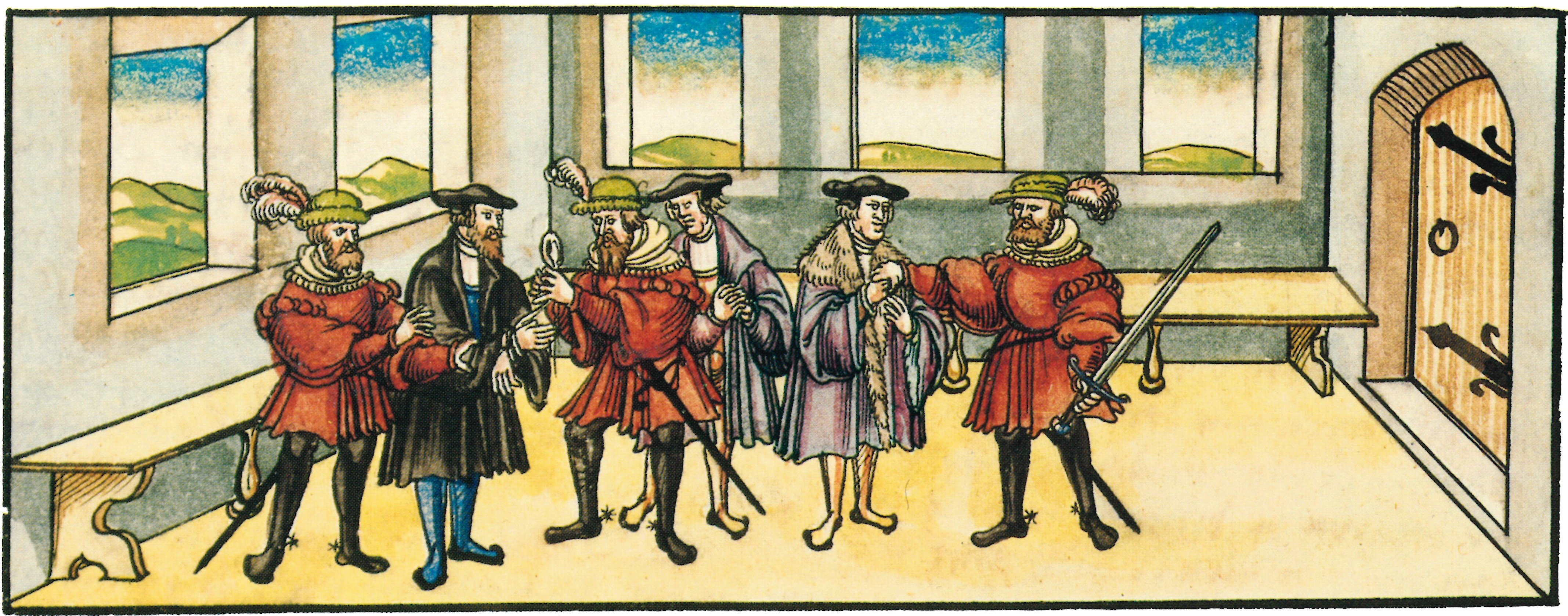 Lorenz Fries, Bischofschronik von Würzburg, Folio 313r, Gefangennahme der Ratsherren von Stadtschwarzach 1457